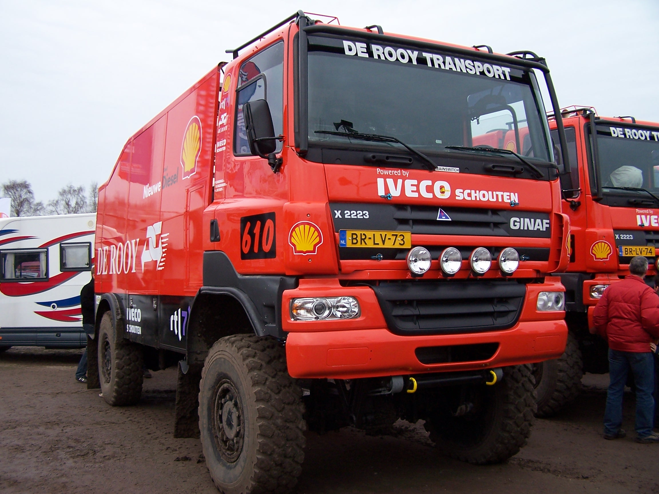 Ginaf X2223 powered by Schouten Iveco